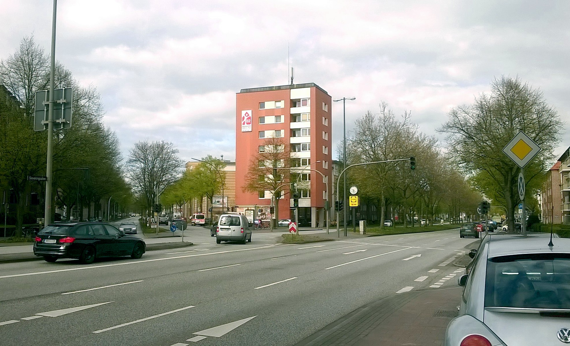 Einmündung des Sievekingdamms (li.) in die Sievekingsallee (von re.) im Hamburger Stadtteil Hamm, beides vielbefahrene Zubringer zur Autobahn A 24 („Horner Kreisel“)